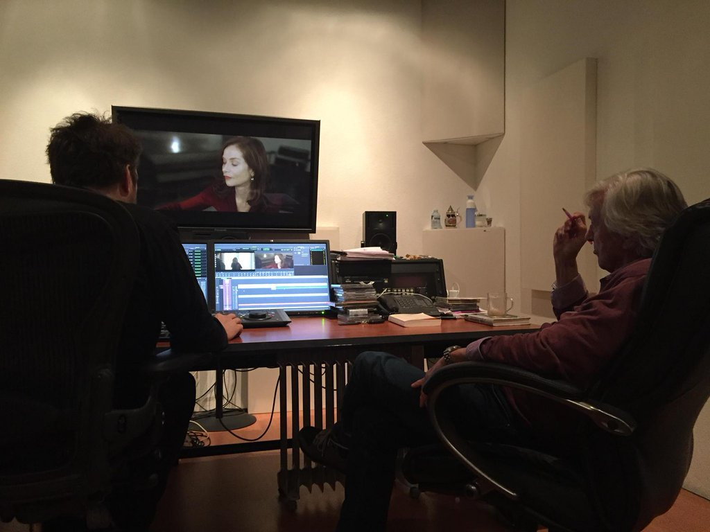 Paul Verhoeven dans sa salle de montage à Amsterdam pour son film "Elle" (2016).